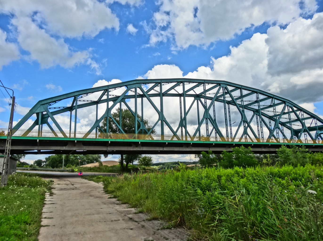 Most fordoński im. Rudolfa Modrzejewskiego nad Wisłą w Bydgoszczy-Fordonie